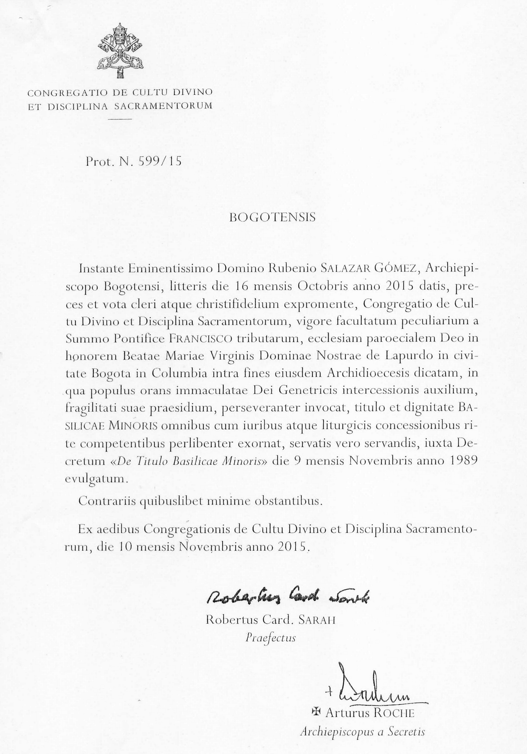 Decreto de consagracion del Templo de Ntra. Sra. de Lourdes con el título de Basílica